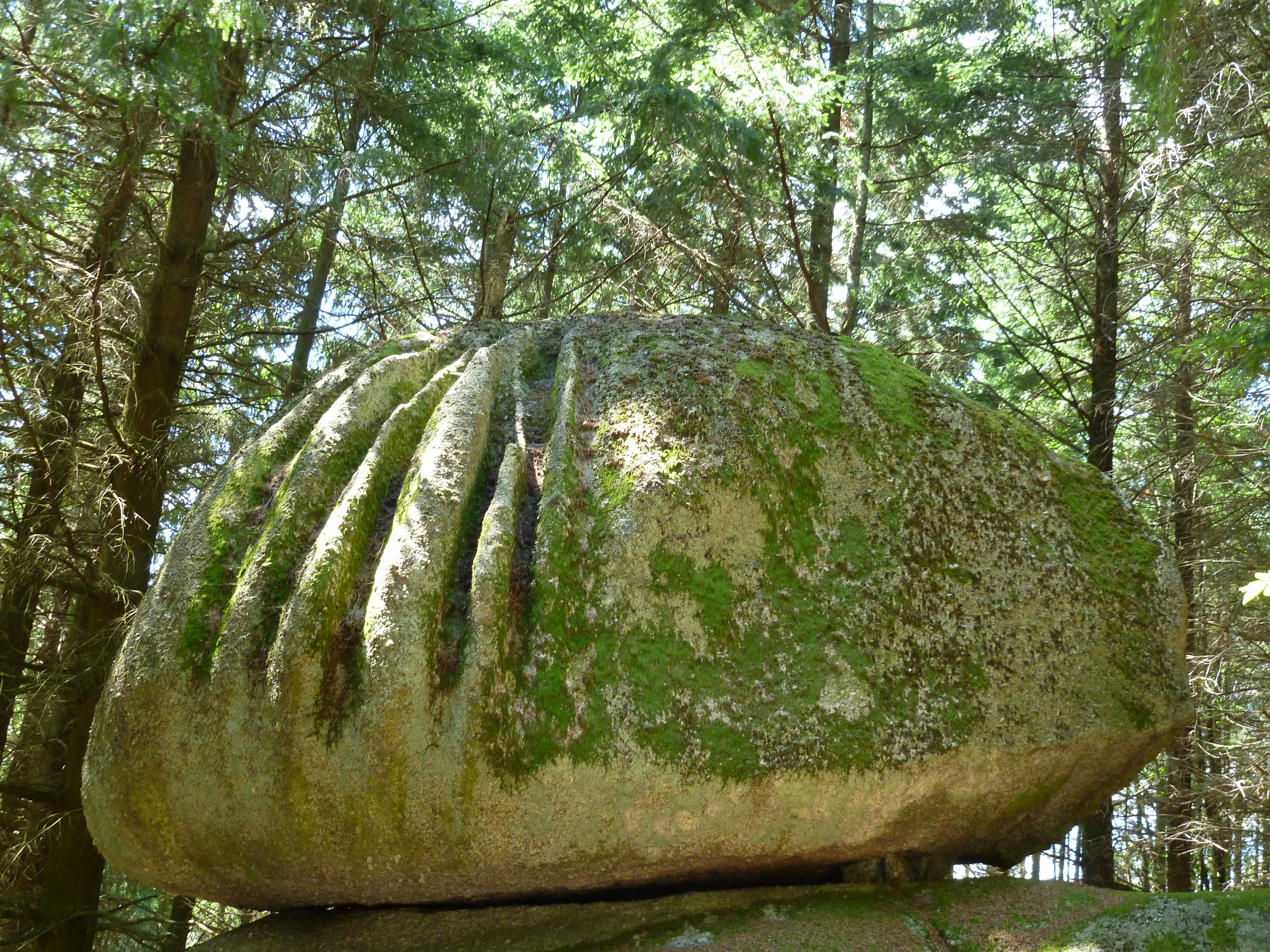 Chaos granitique "La Griffe du Diable" sur le site d'Uchon (Saône-et-Loire - France)